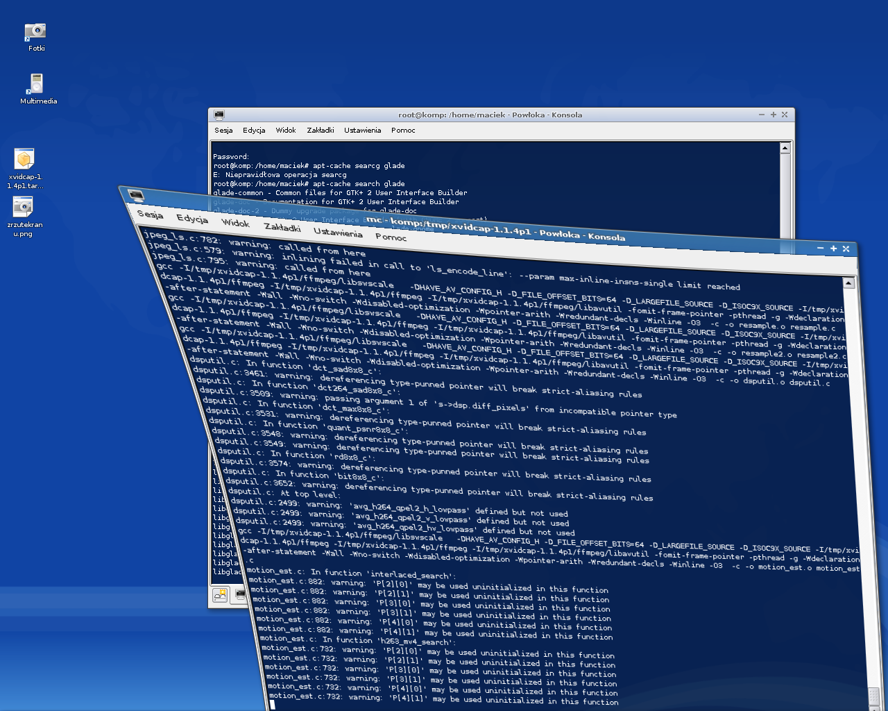 Pokazanie "bąbelkowatych" okien w Berylu w KDE